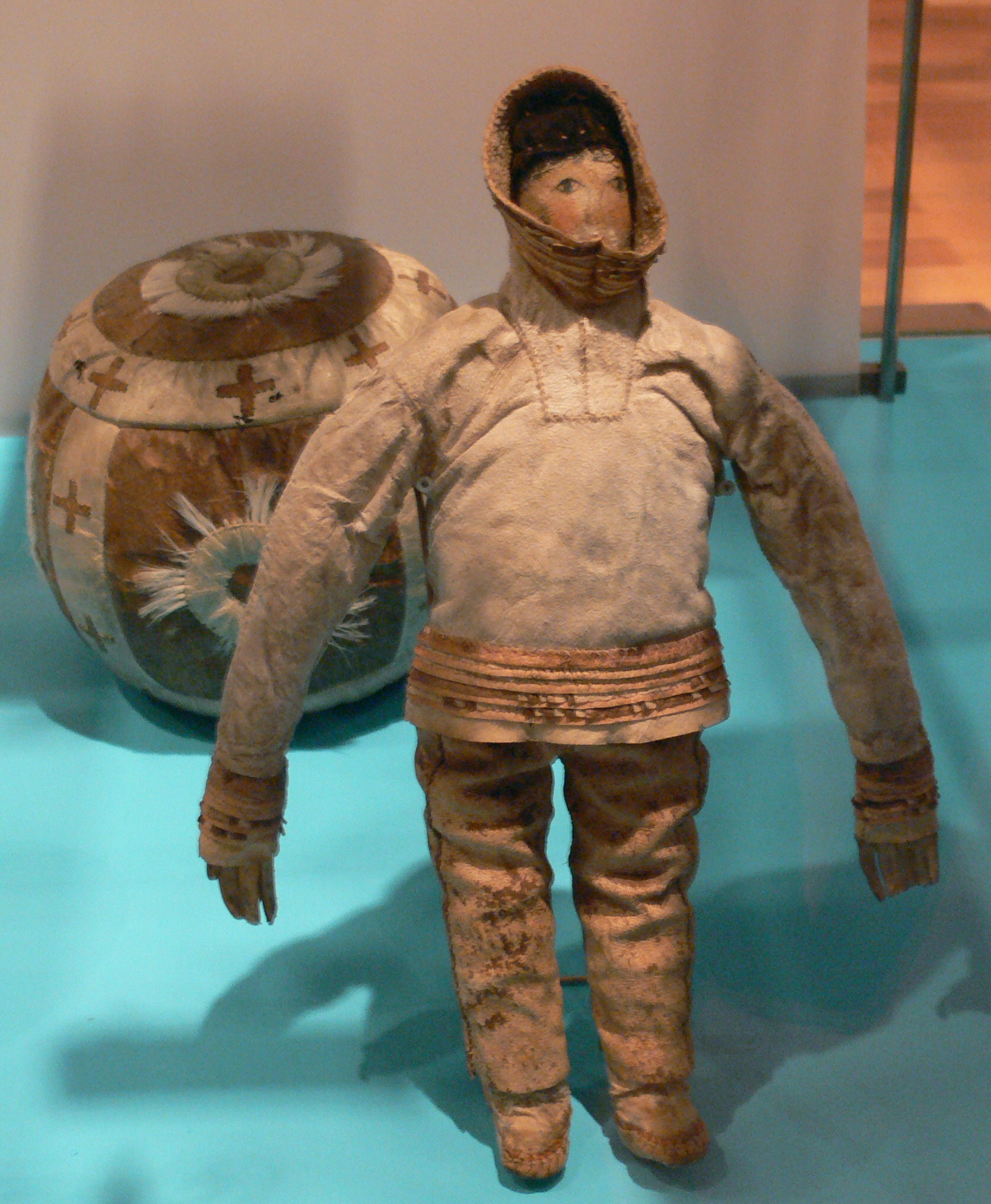 Stuttgart, Linden-Museum Puppe, Grönland, 1. Hälfte 19. Jh. Spielball, Westarktis, um 1900; Robbenleder mit Leder- und Fellapplikationen, mit Moos gefüllt